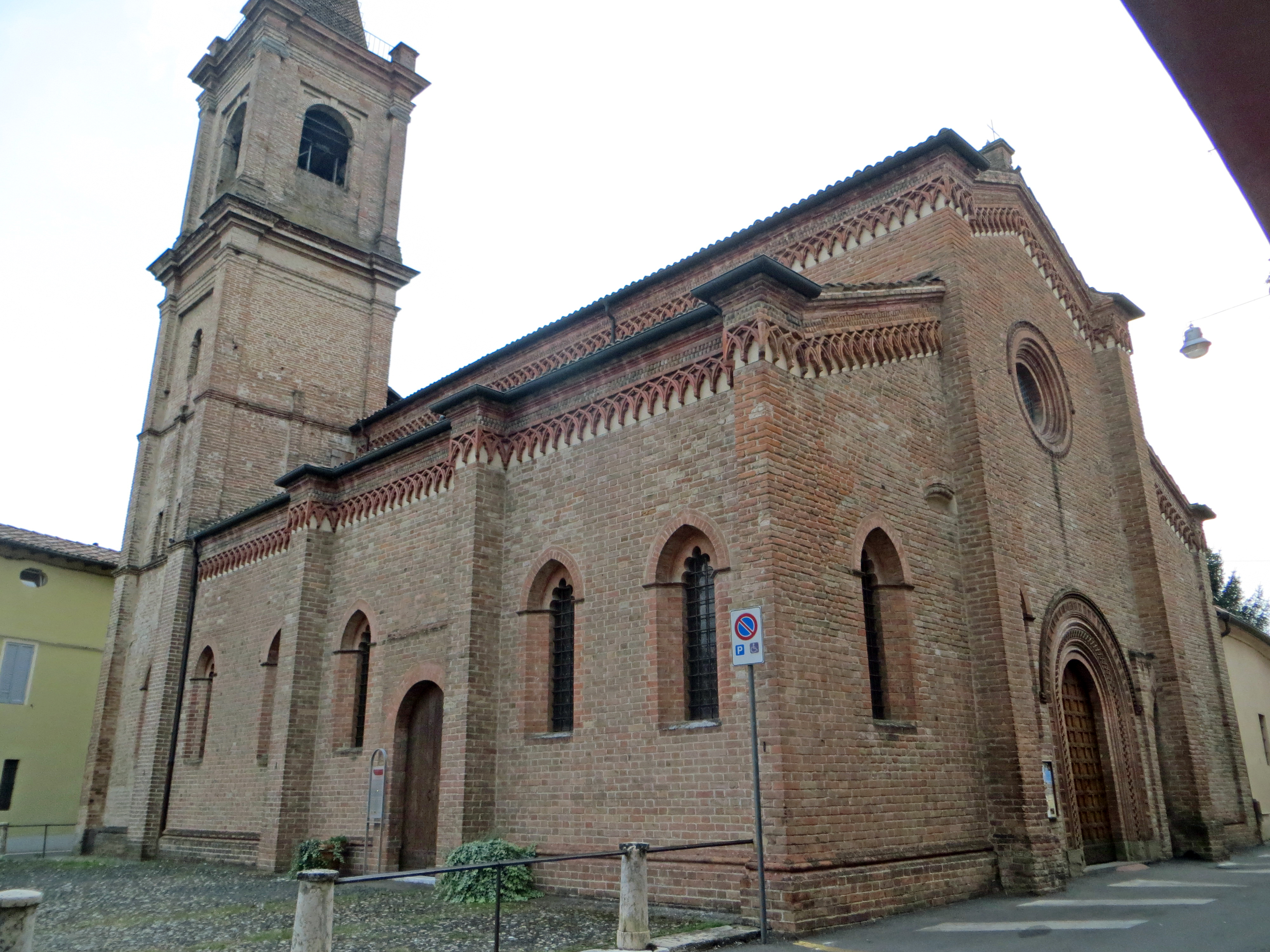 Chiesa di Santa Croce (Fontanellato) - facciata e lato nord